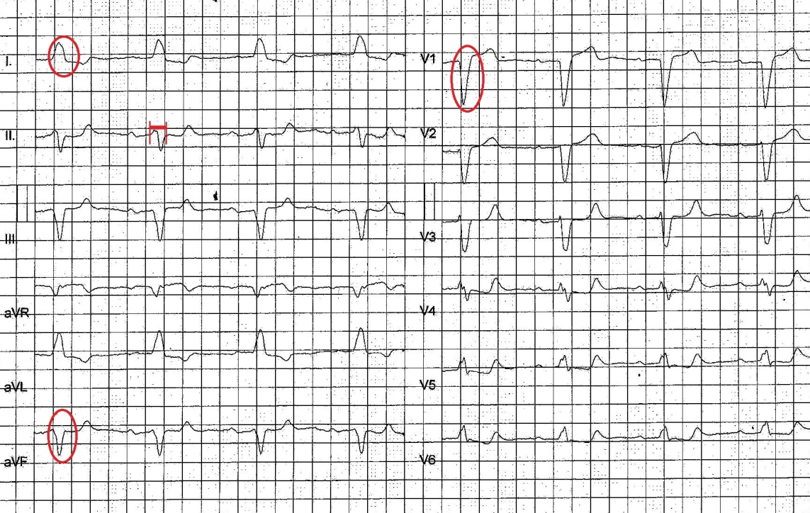 Elektrokardiogram pri poruche prevodu srdcových vzruchov (blokáda ľavého Tawarovho ramienka). Trvanie komplexu QRS je predĺžené (červená úsečka) a jeho tvar je charakteristicky zmenený (napr. zakrúžkované komplexy- porovnajte s normálnym EKG)